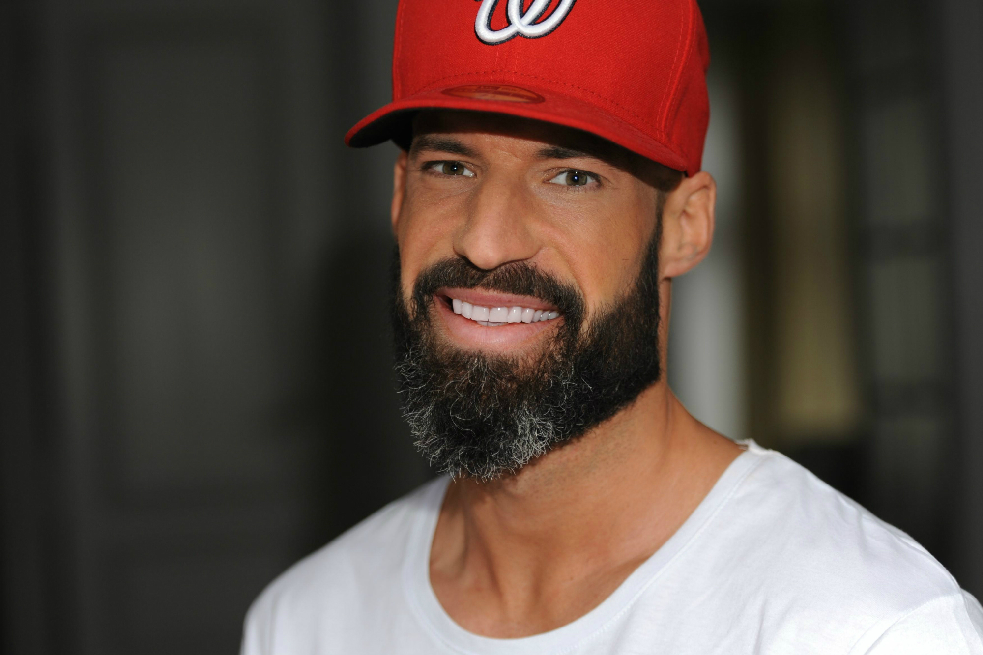 Porträt von Matthew Mockridge